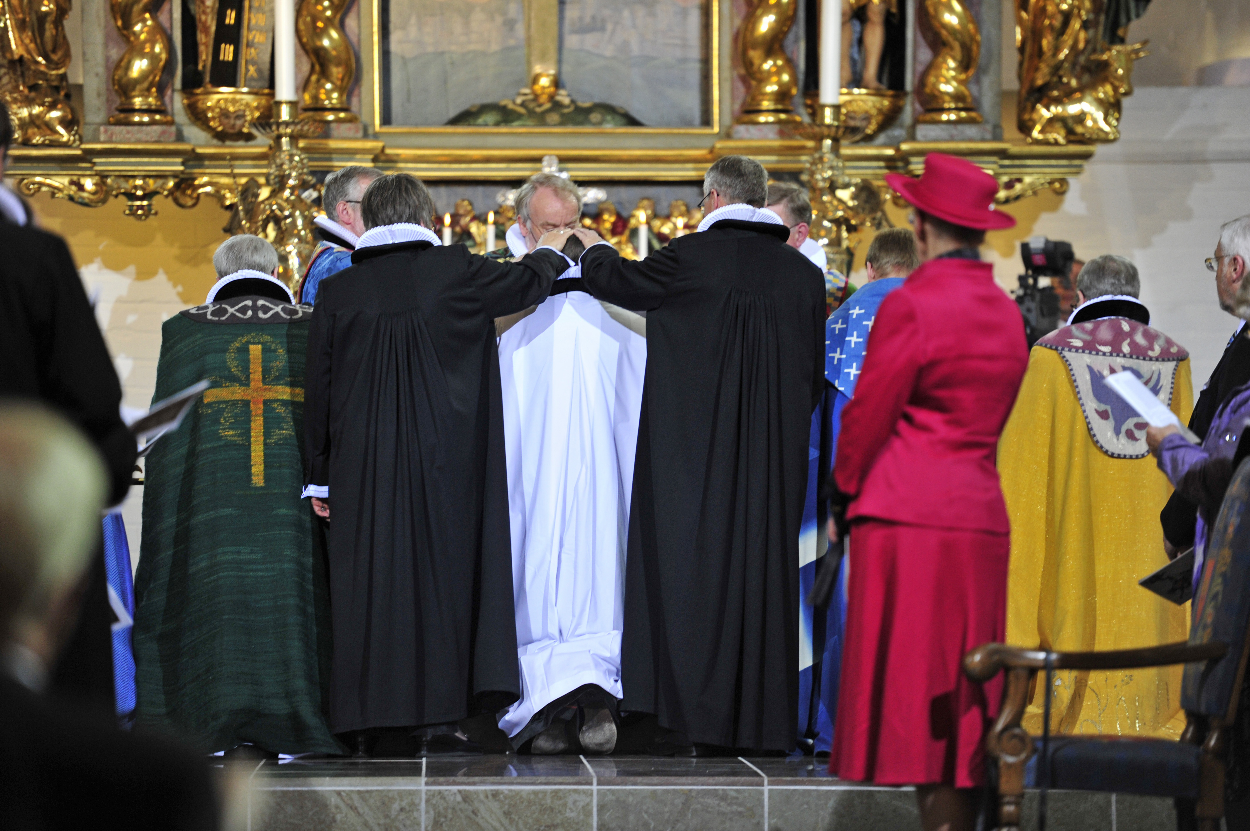 Henning Toft Bro (i midten) vies til biskop under bøn og håndspålæggelse i Aalborg. En helt central del af bispevielsesritualet. Dronning Margrethe i rødt kigger på.